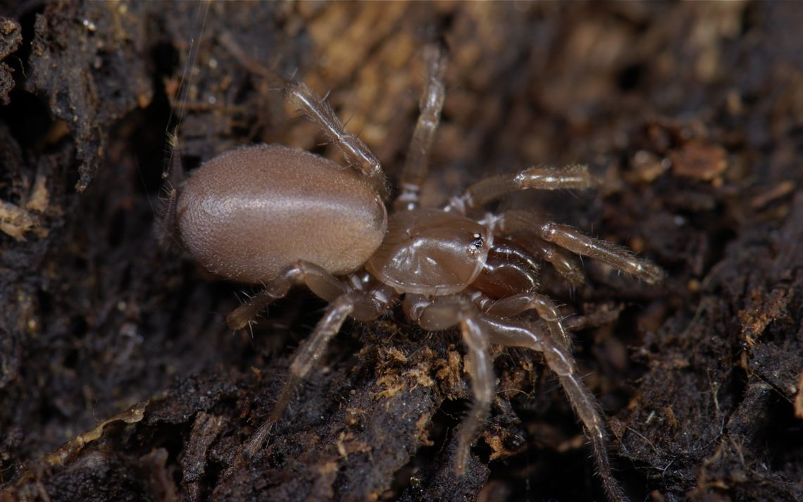 Megahexura fulva from Sierra de Salinas